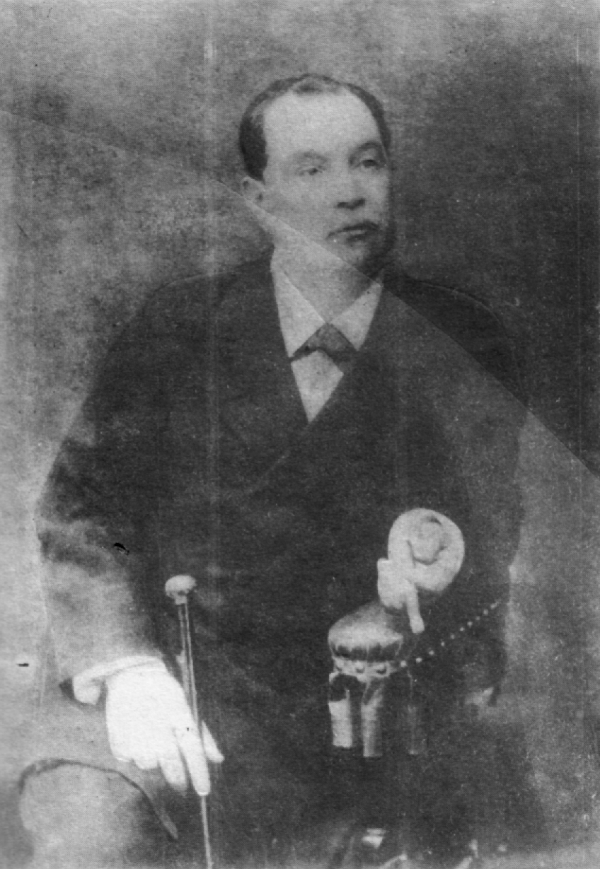 Auguste Dreyfus (1827-1897), empresario y financista francés, fundador de una compañía que acaparó la venta del guano de islas del Perú en la década de 1870, con cuyas ganancias hizo una fortuna.